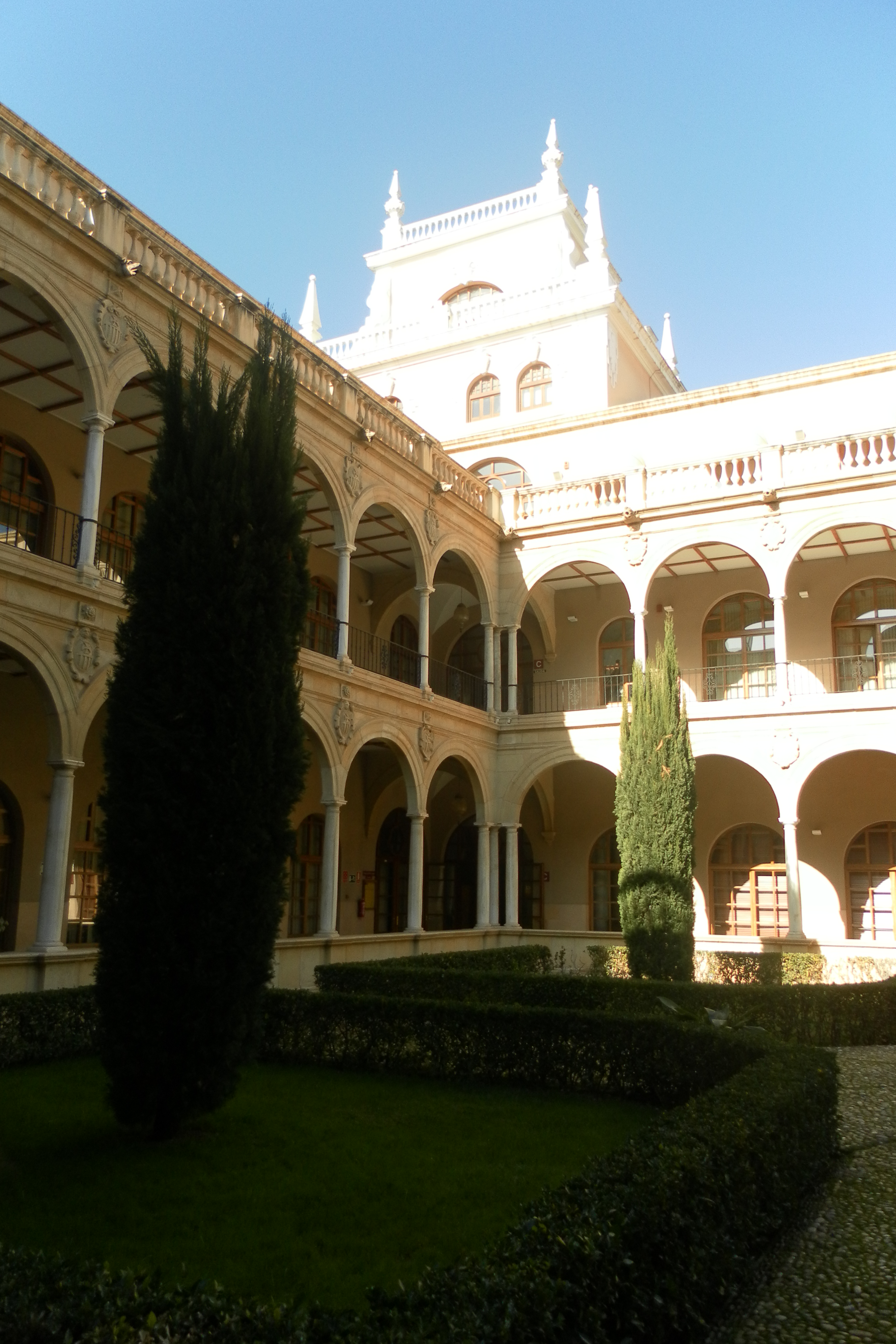 Claustro de la Merced. Actual Facultad de Derecho de la Universidad de Murcia. (Región de Murcia, España). Comienzos del siglo XVII.